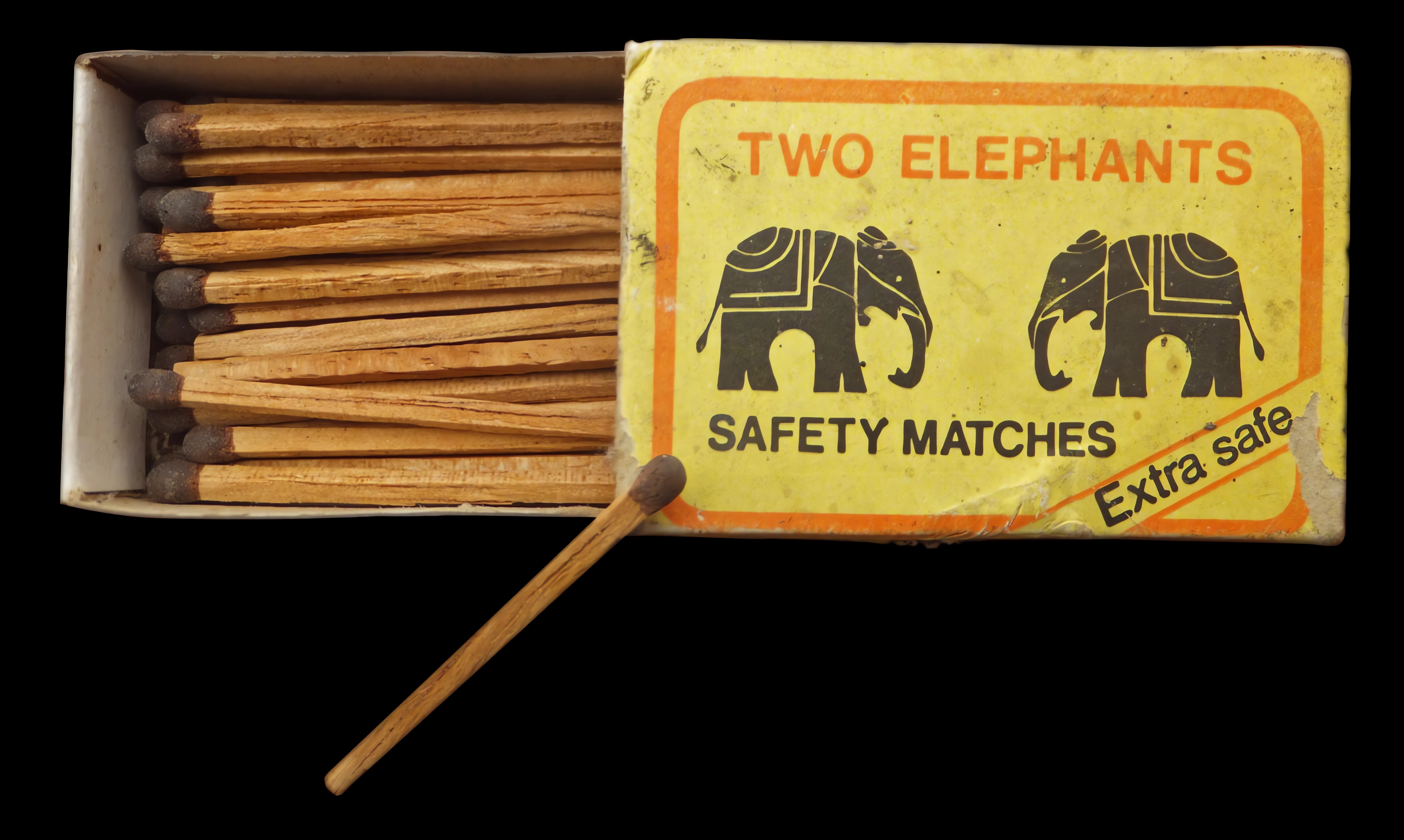 සිංහල: අලියා ගිණිපෙට්ටියක් සහ එහි ගිණිකූරු